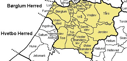 Børglum Herred, Hjørring Amt, Denmark